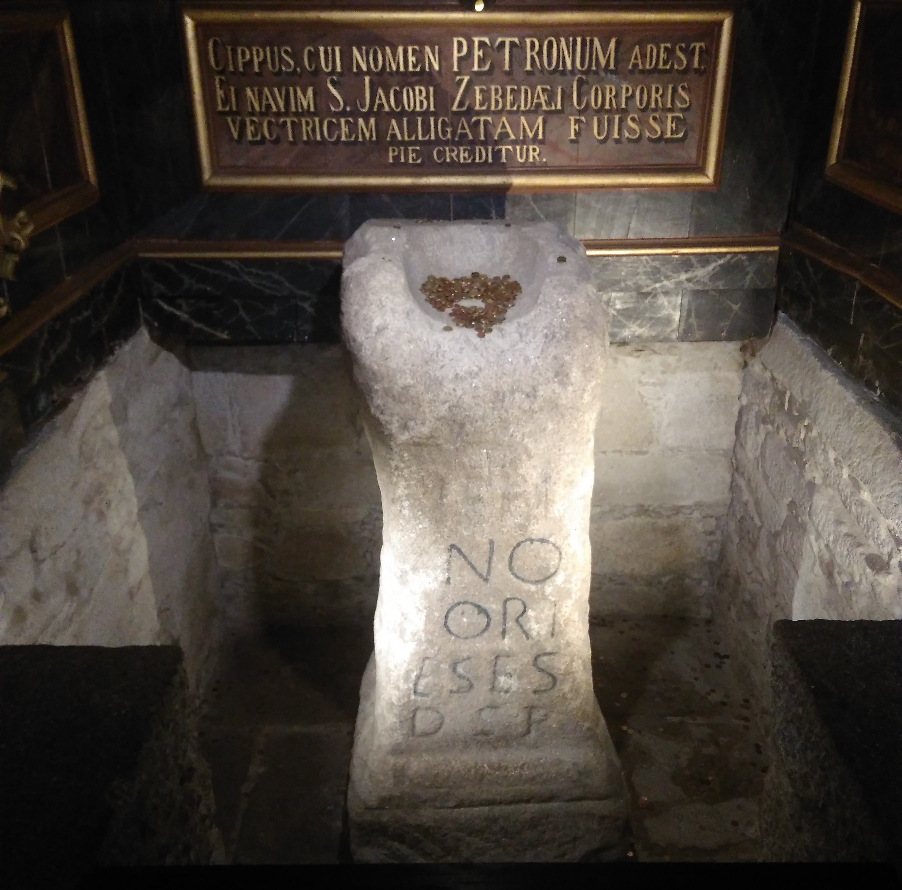 O Pedrón de Padrón é unha ara romana dedicada a Neptuno, pódese ler na ara a inscrición «NO ORI ESES D S P»: "A Neptuno, os orieses, puxeron ás súas expensas". A tradición cristiá da Traslatio Xacobea, recollida no Libro III do Códice Calixtino, relata que os discípulos do apóstolo Santiago amarraron no Pedrón a barca que portaba o corpo do santo, seguindo o costume de cristianizar o pagá.